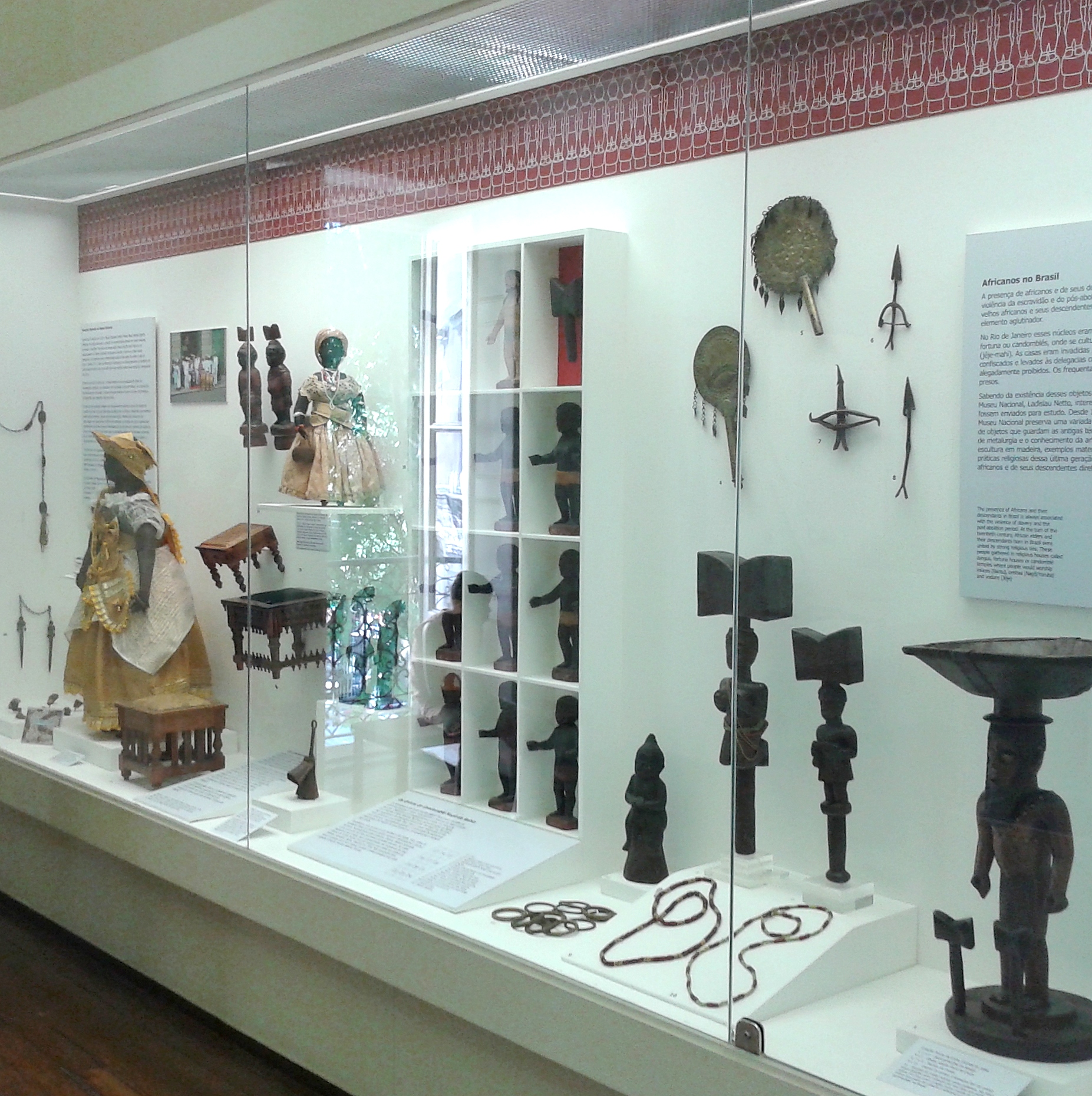 Objetos do candomblé. Acervo de etnologia africana e afro-brasileira do Museu Nacional/UFRJ - Rio de Janeiro, Brasil.